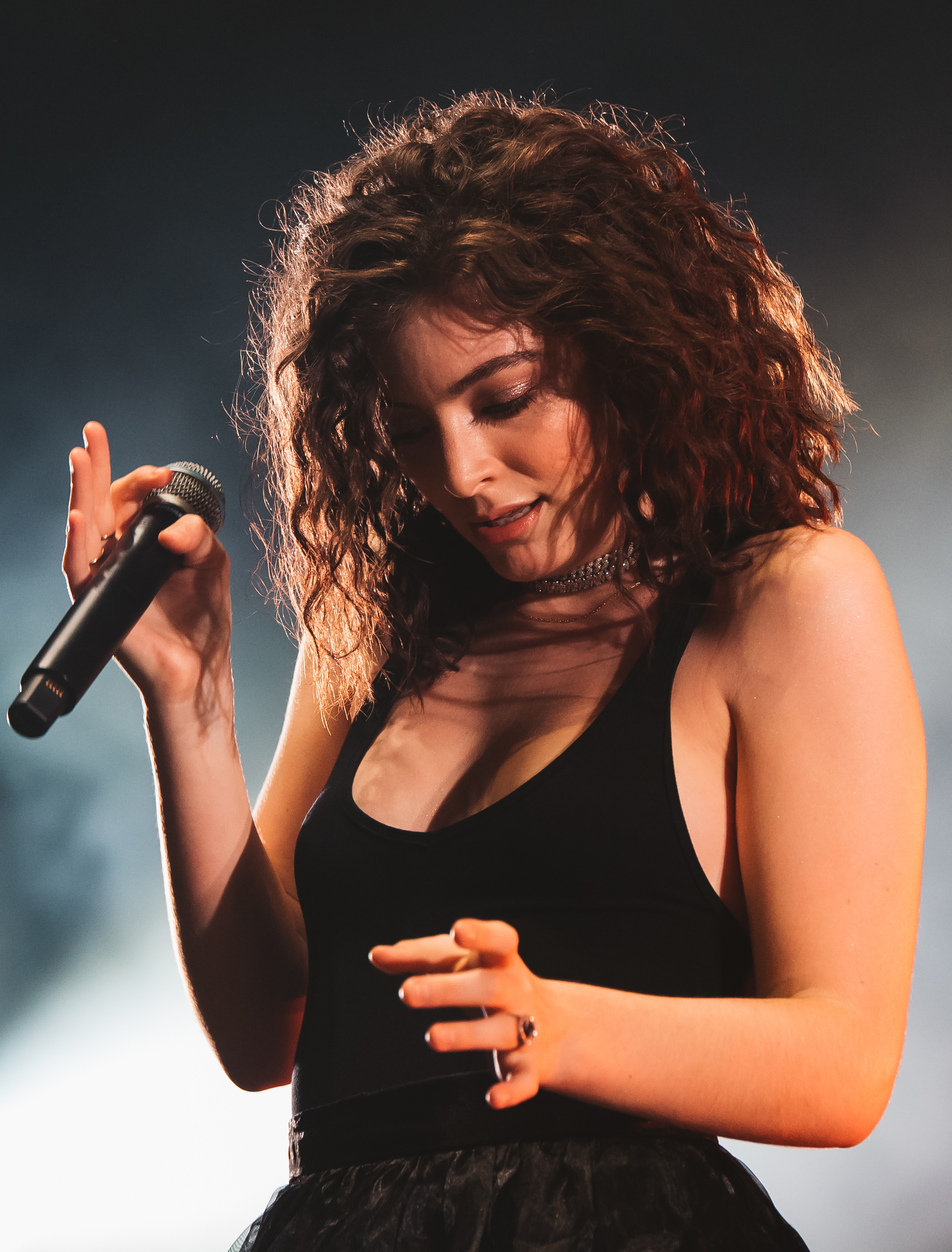 Photo: Krists Luhaers // @Kristsll